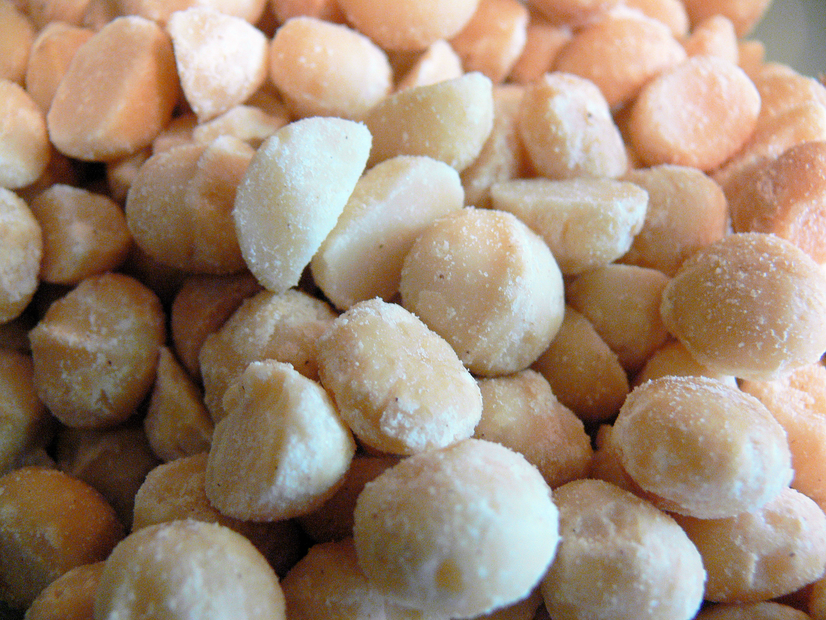 Tasty, tasty macadamia nuts